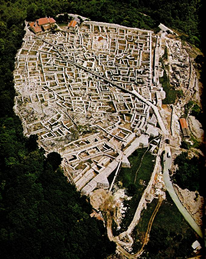 The fortress of Schumen, Шуменска крепост, die Festung von Schumen